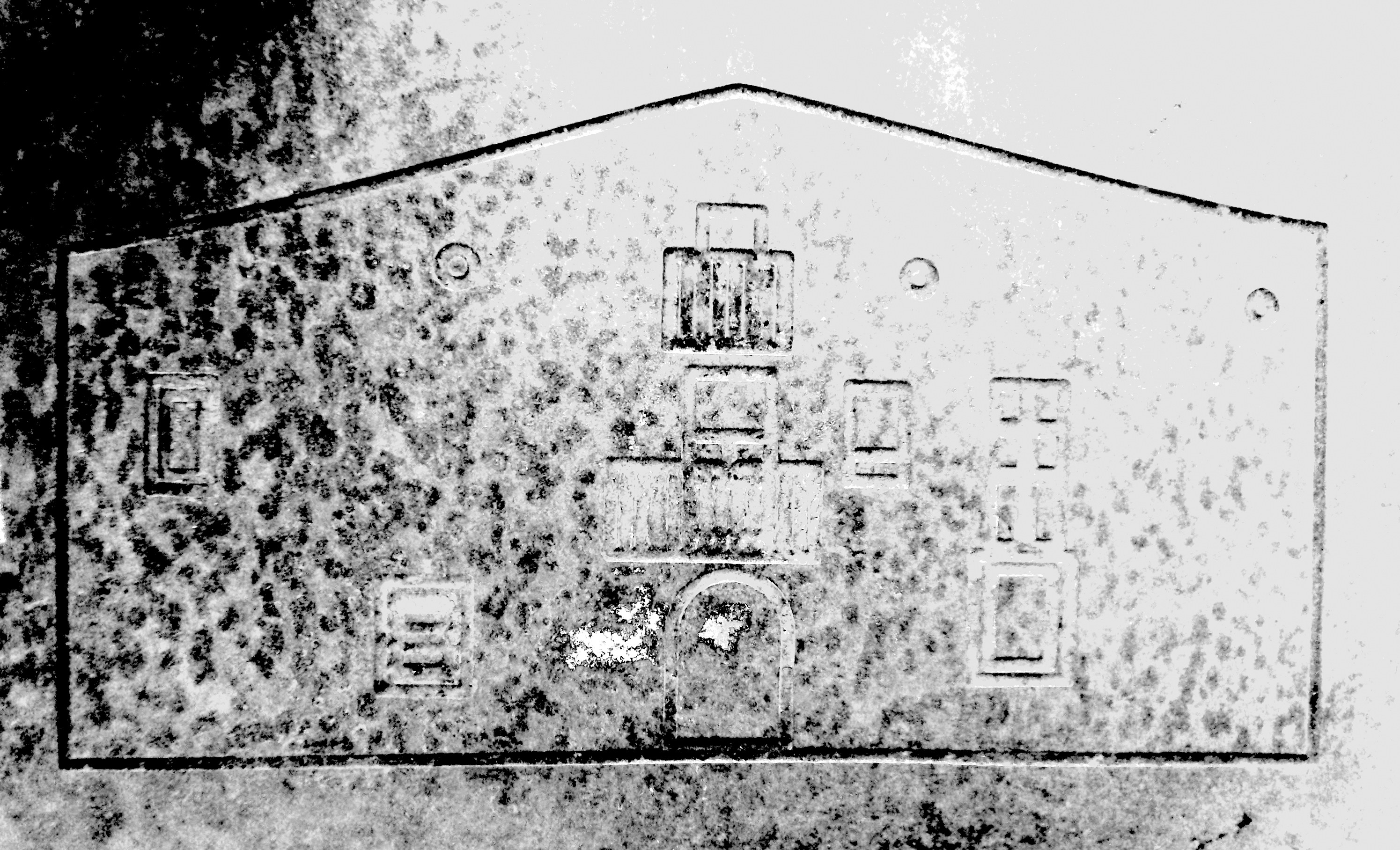 Jardins de Can Xiringoi.